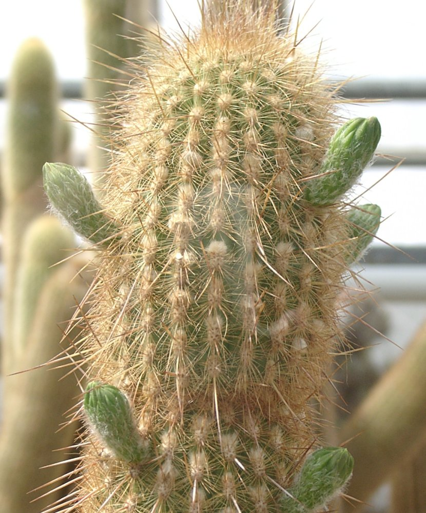 Haageocereus pseudomelanostele